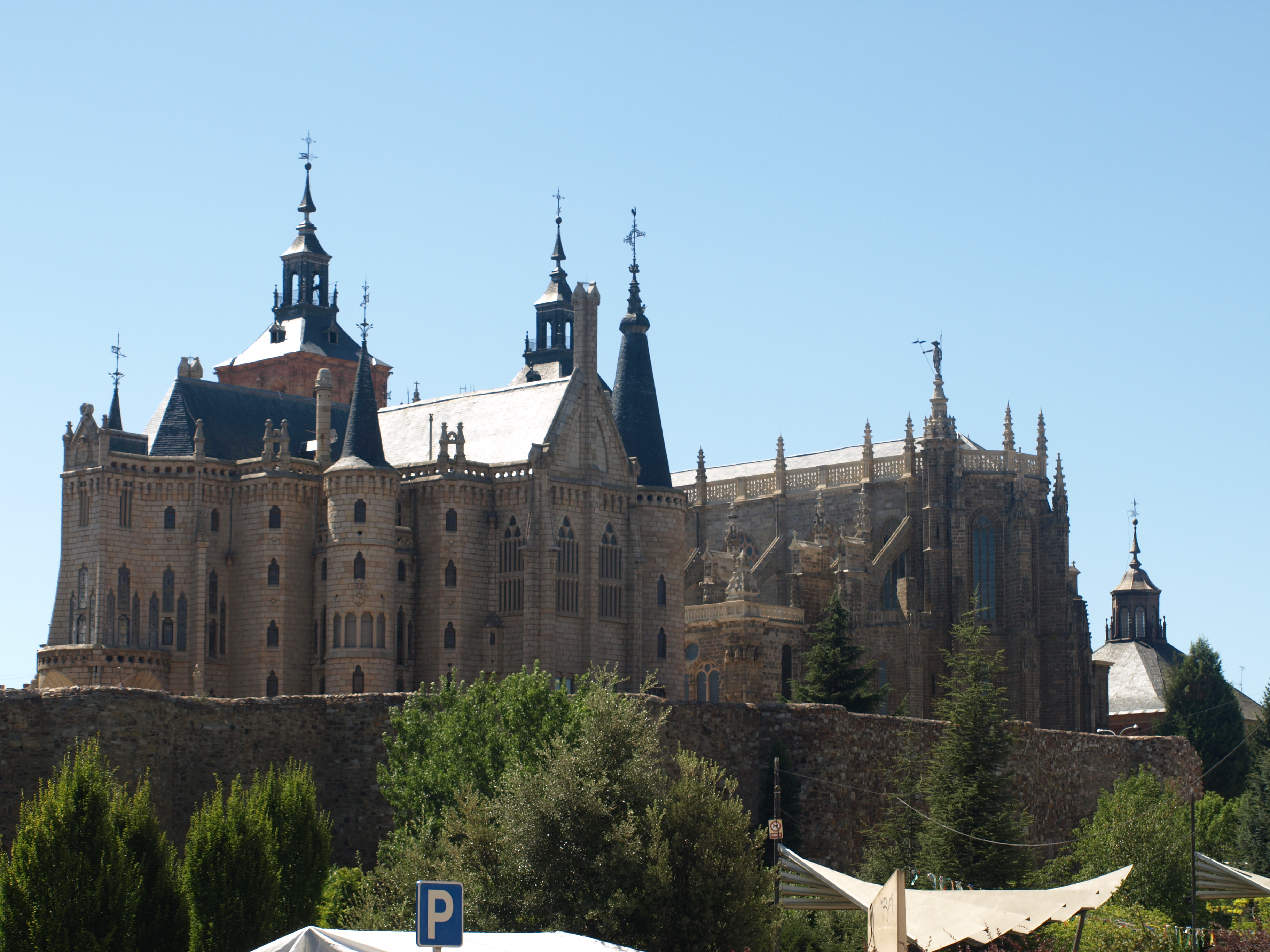 Catedral de Antonio Gaudí en Astorga